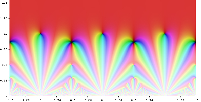 Eisenstein series G_14